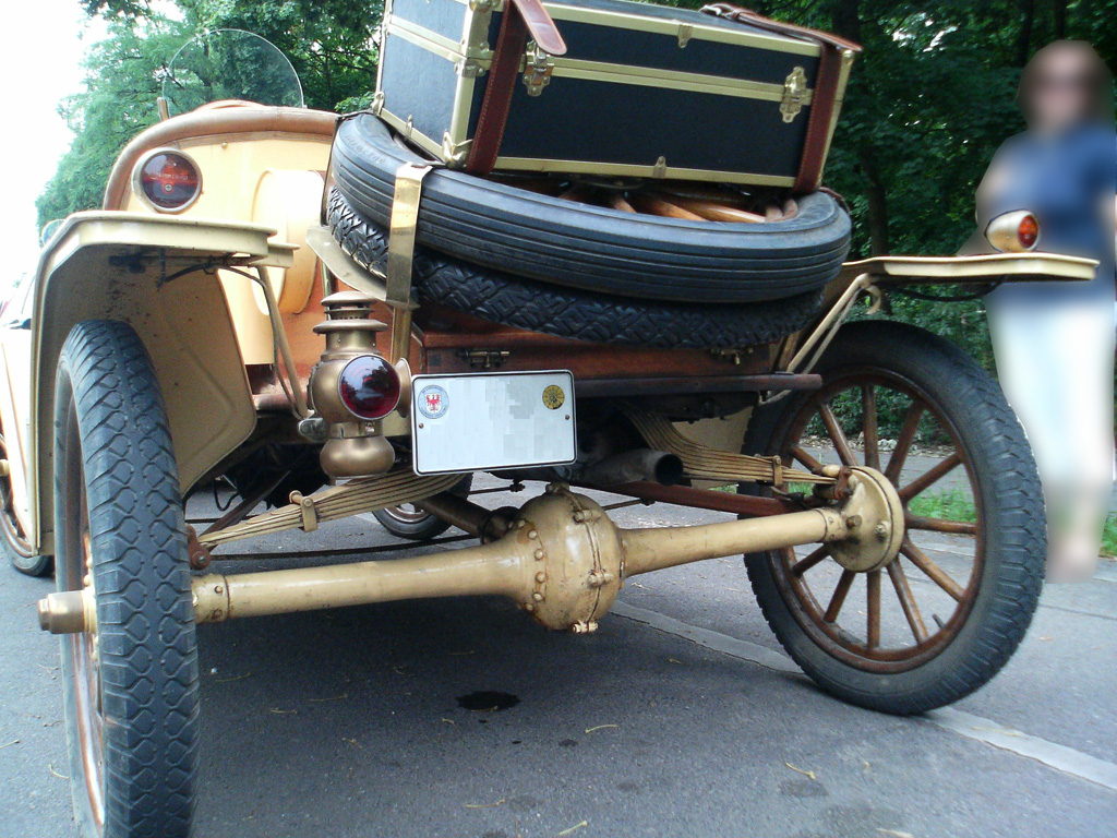 alter Ford